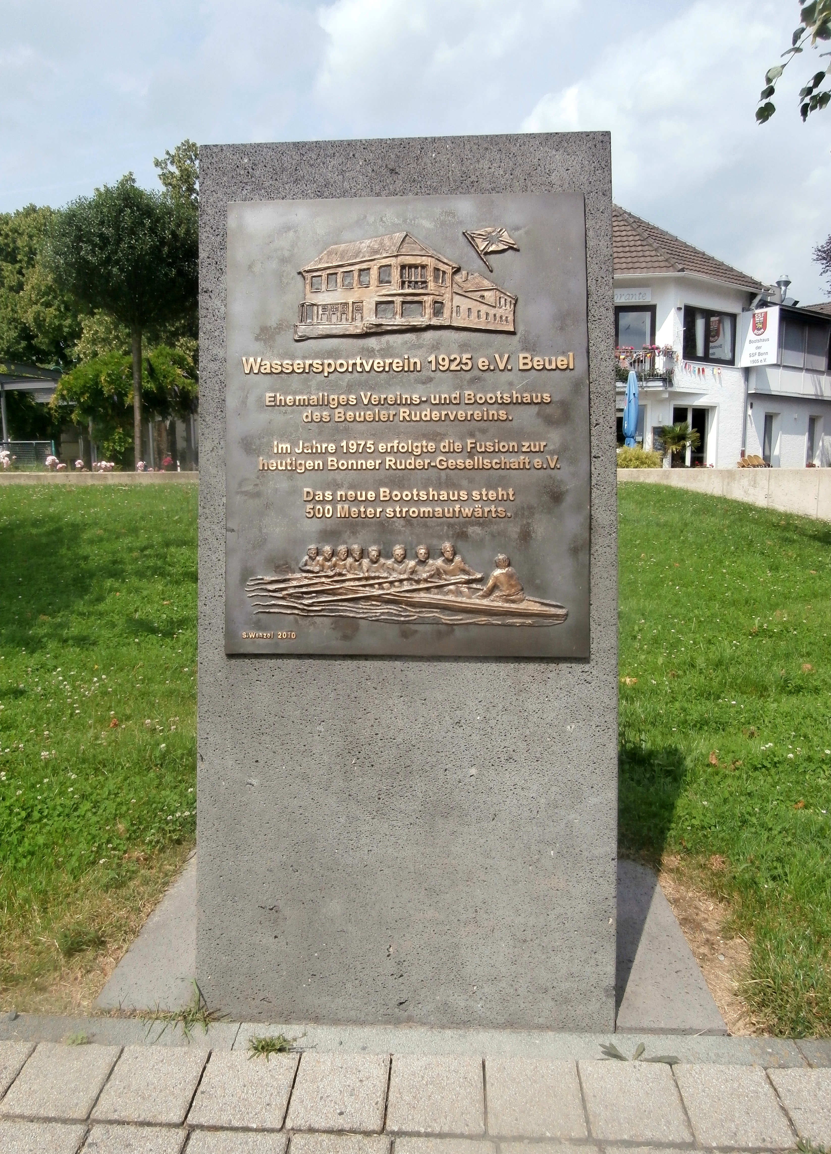 Informationstafel am ehemaligen Standort des Vereins- und Bootshauses des Beueler Rudervereins, Johannes-Bücher-Ufer, Bonn-Beuel-Mitte. Angefertigt von Sigrid Wenzel im Jahre 2010.